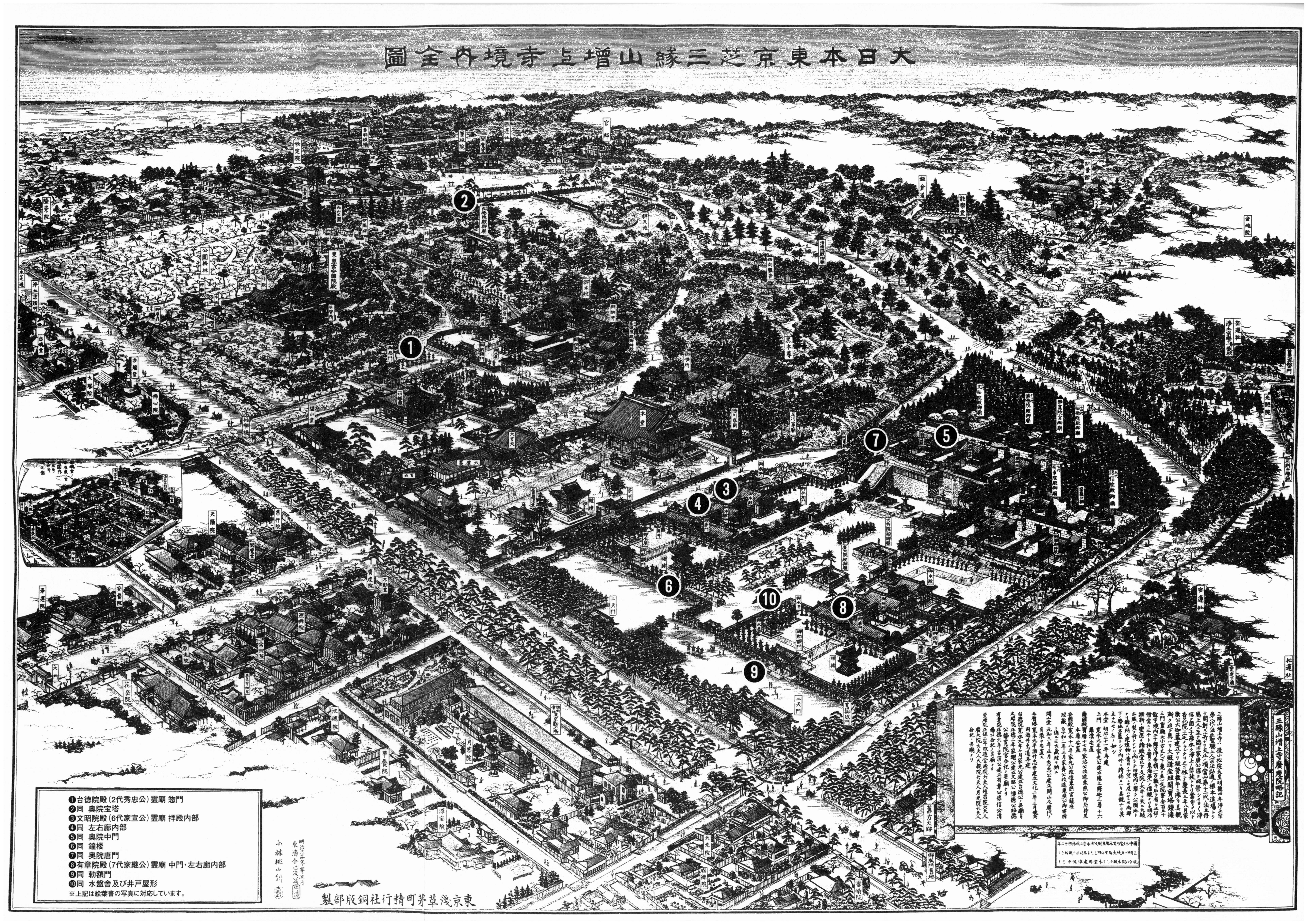 大日本東京芝三縁山増上寺境内全図